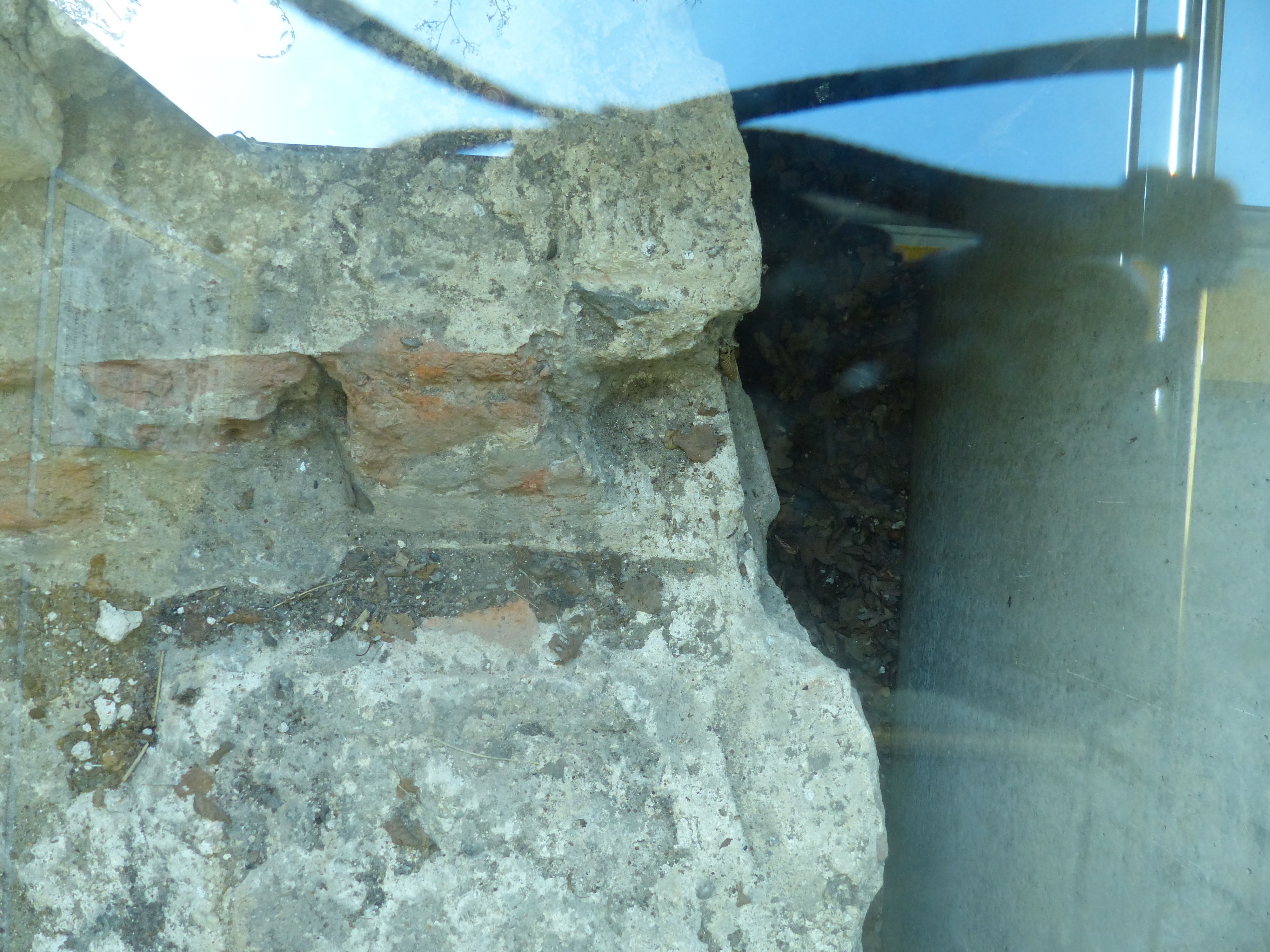 Mauerrest des Schlosses Langwedel aus Sandstein und Backstein unter dem Eingang des Burgbades Langwedel